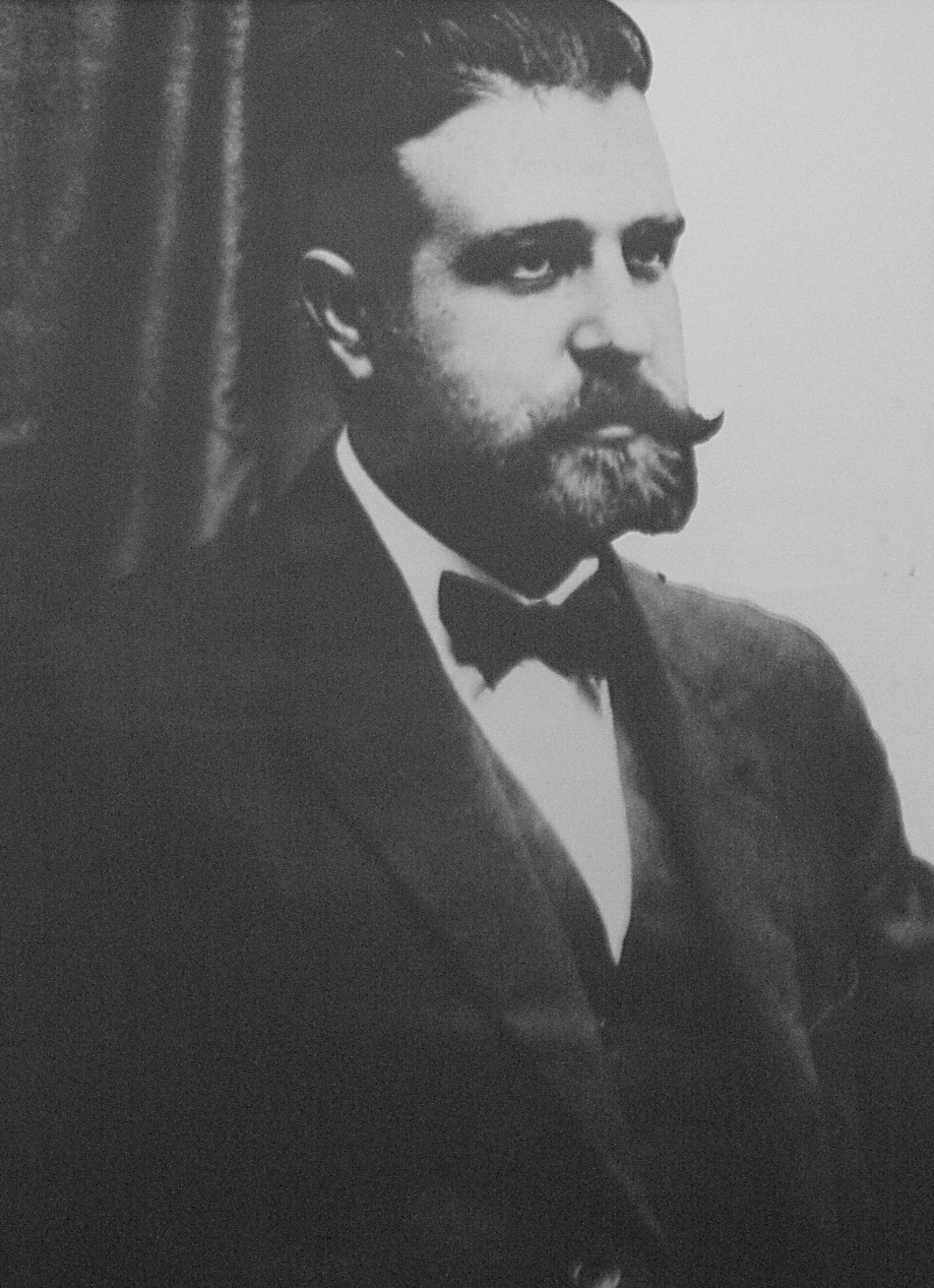 Iu Pascual i Rodés (Vilanova i la Geltrú, 1883 - Riudarenes, 1949) va ser un pintor català de l'escola d'Olot